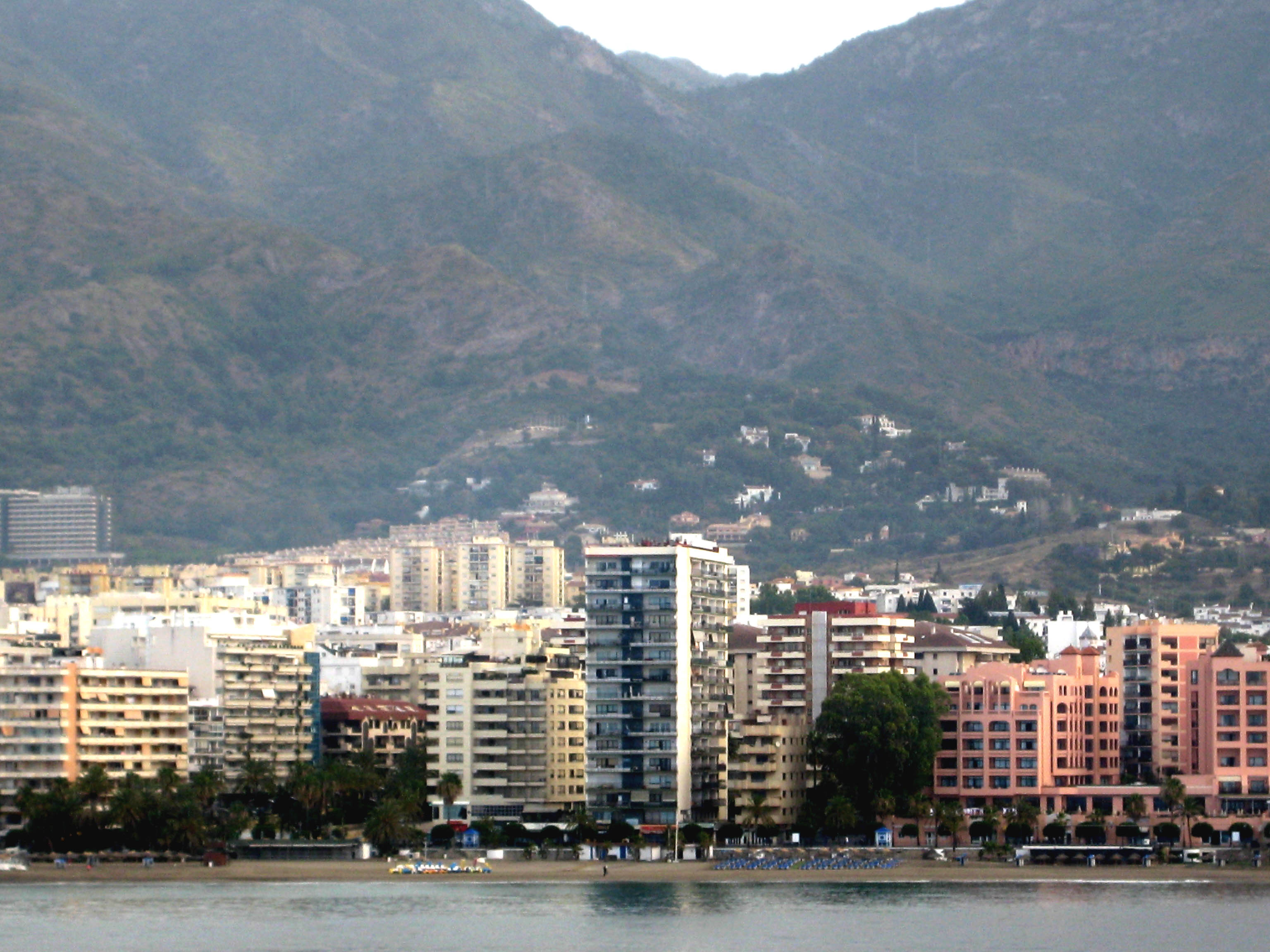 Skyline vu Marbella